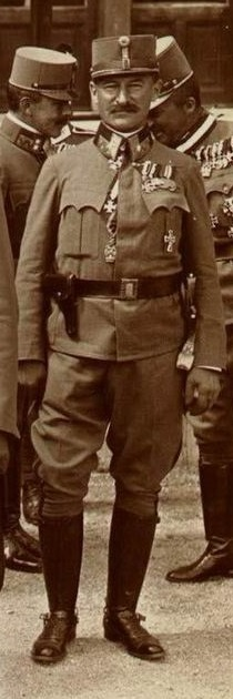 Generalmajor Géza Lukachich de Somorja bei der 180. Promotion in der Geschichte des Militär-Maria-Theresien-Ordens am 17. August 1917 im Schloss Wartholz. Es handelt sich hierbei um einen Ausschnitt aus einem Gruppenfoto.